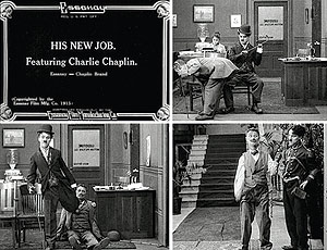 fotografía de la película His new job de 1915